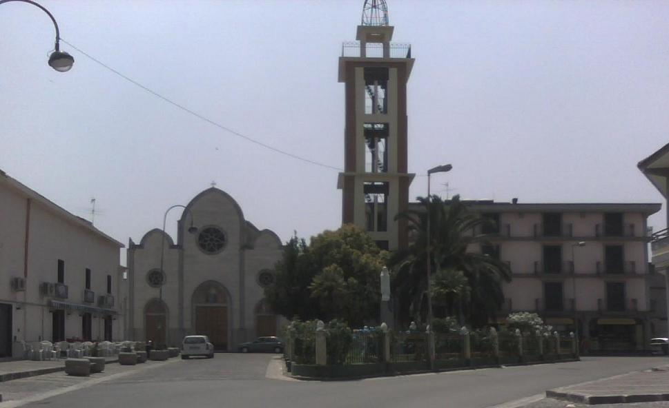 Foto della chiesa di Montevergine di Grazzanise (ce)